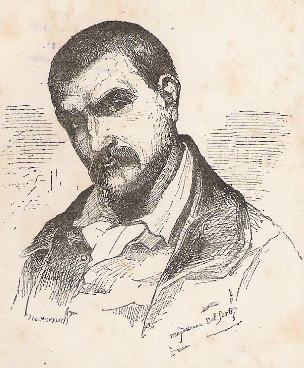 François Delsarte, gravure de Madeleine Delsarte. François Alexandre Nicolas Chéri DELSARTE né à Solesmes, 59730, Nord,France le 11 novembre 1811. L'artiste à signé " Magdeleine Del Sarte "Marie Magdeleine Blanche Geneviève DELSARTE artiste peintre (1853 -1927) est la fille de Chéri Delsarte 1811-1871). Elle a épousé en 1887 Désiré Louis Réal (1852 1909)père de Maxime Louis Camille (1888-1954) sculpteur français très connu, fondateur et chef des Camelots du Roi. Maxime Réal del Sarte, catholique fervent, fut toute sa vie admirateur de Jeanne d'Arc à laquelle il consacra de nombreux travaux.